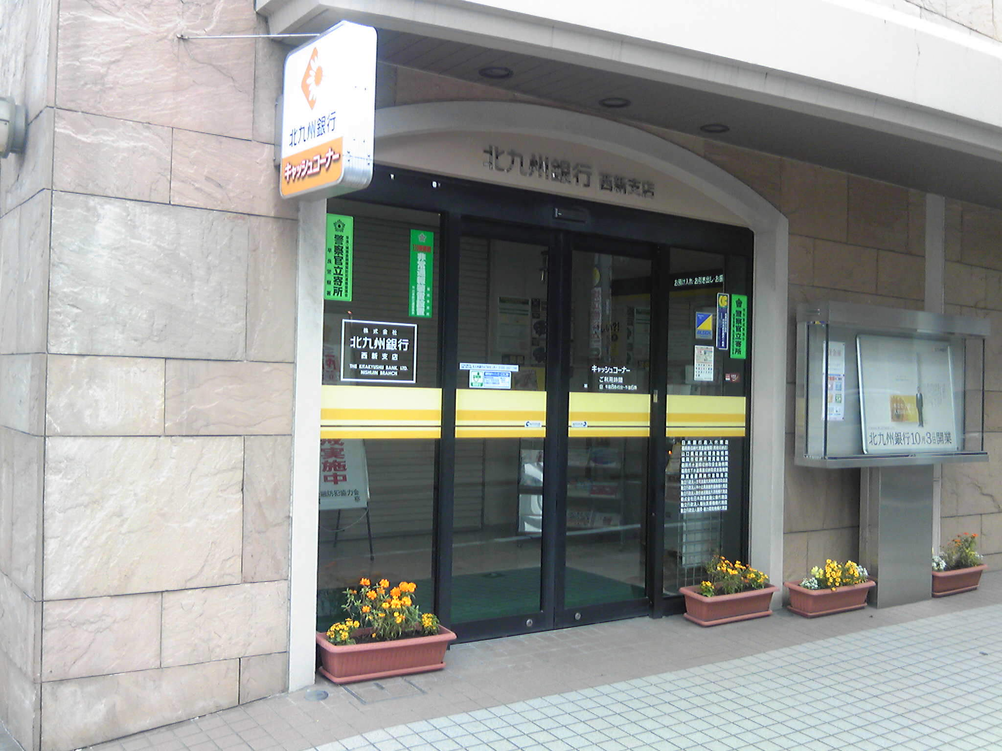 北九州銀行西新支店（福岡市早良区）